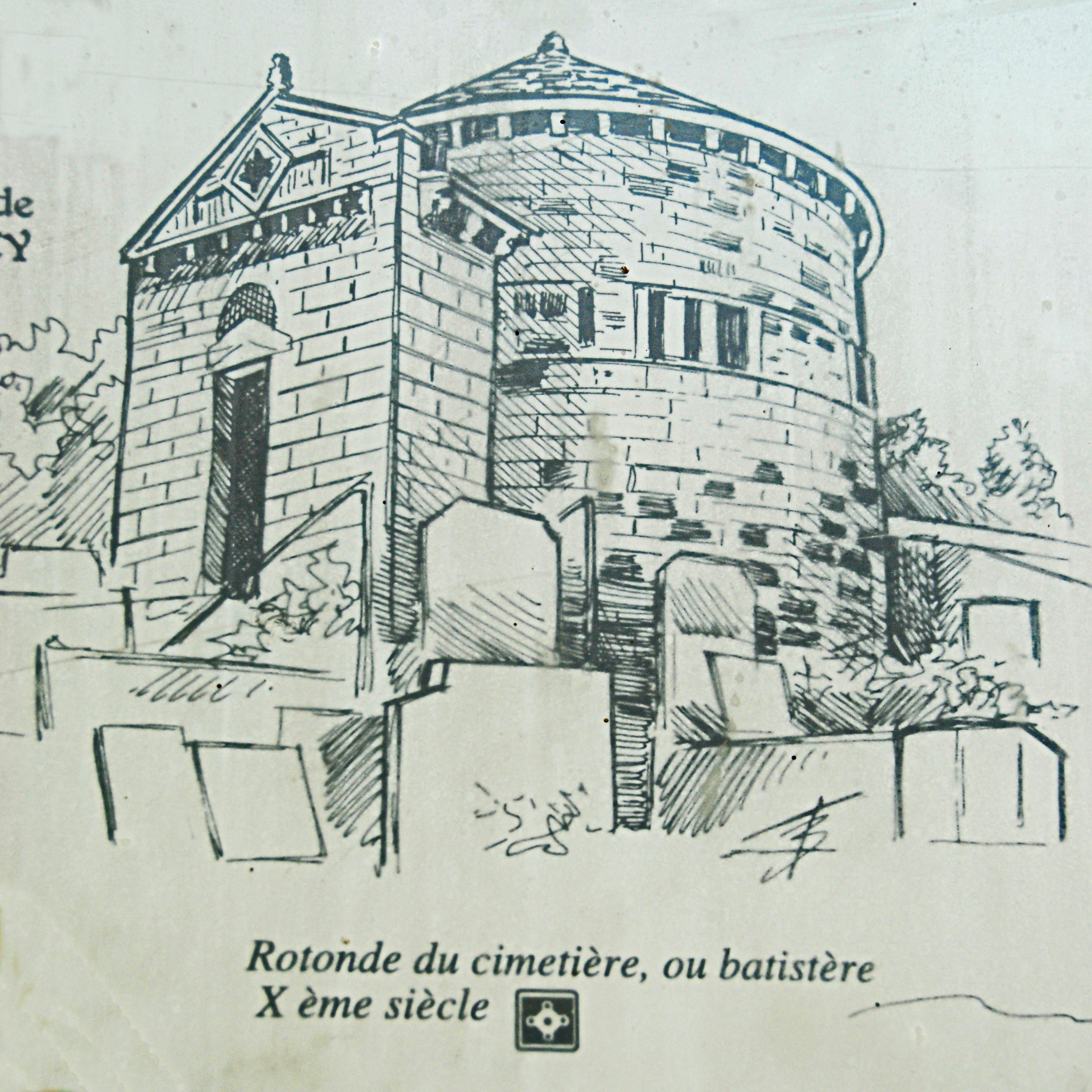 Chambon-sur-Lac, Friedhofskapelle, örtlich aufgestelltes Schild